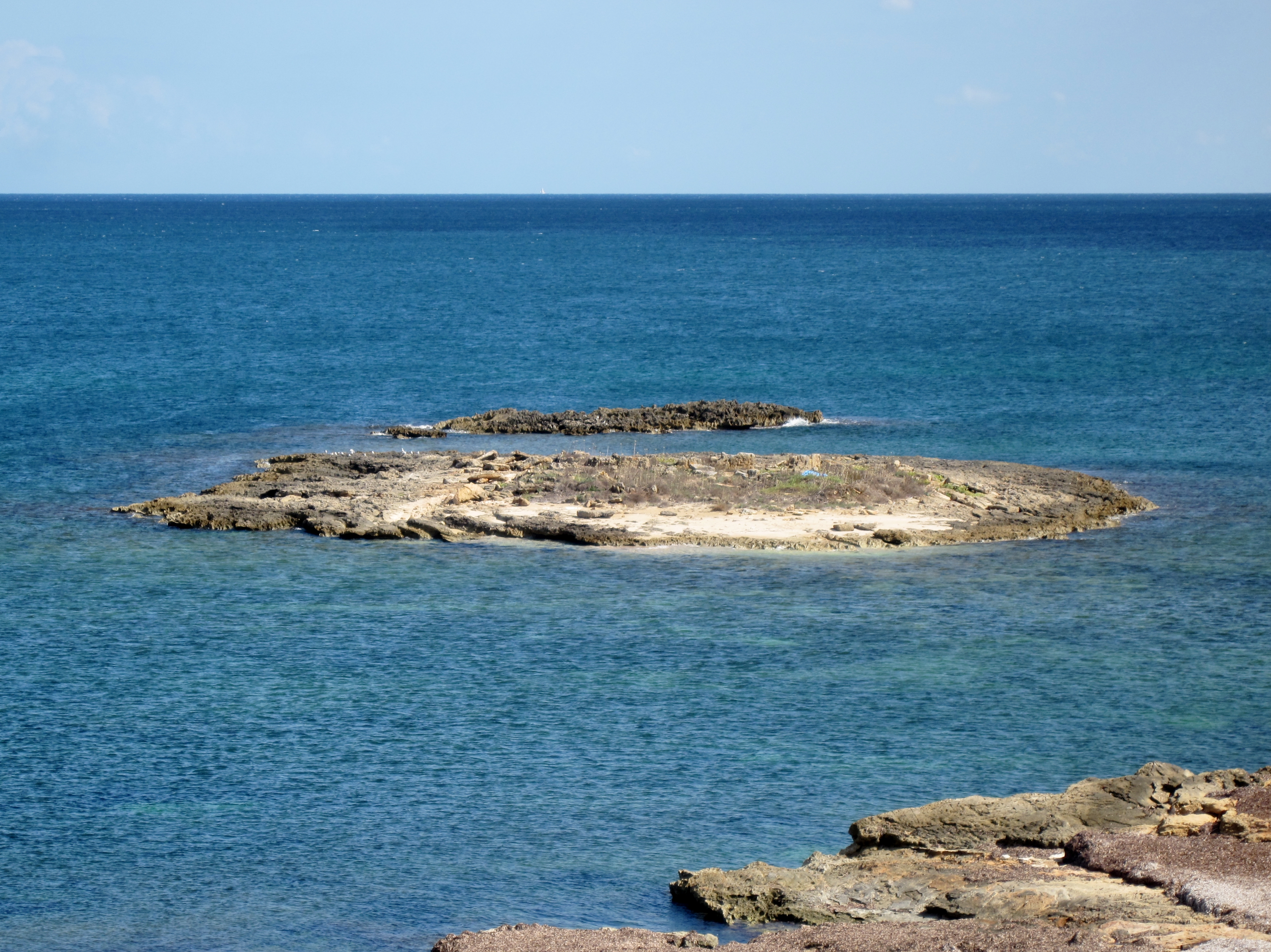 S’Illot des Porros, Gemeinde Santa Margalida, Mallorca, Spanien